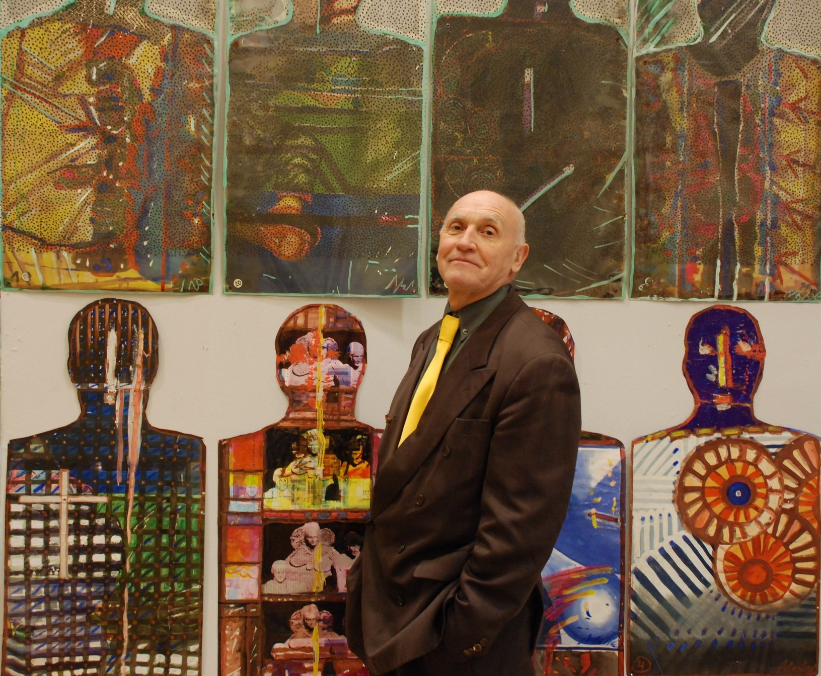 Eugeniusz Molski (ur. 1942 w Bagienicach) - polski artysta współczesny, plastyk, ceramik i podróżnik.